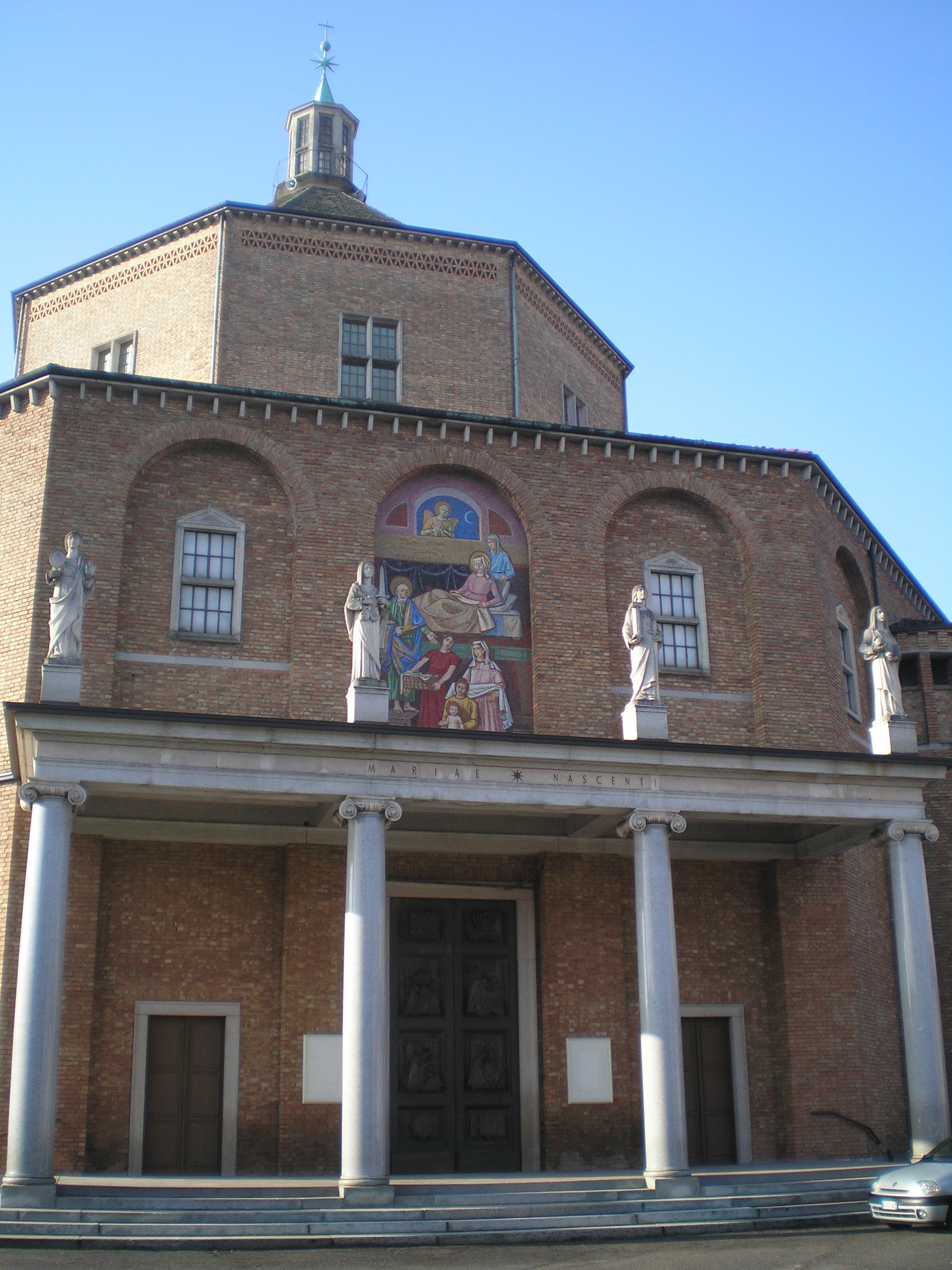 Autore: Bob Garde. Chiesa Santa Maria Nascente di Cabiate.